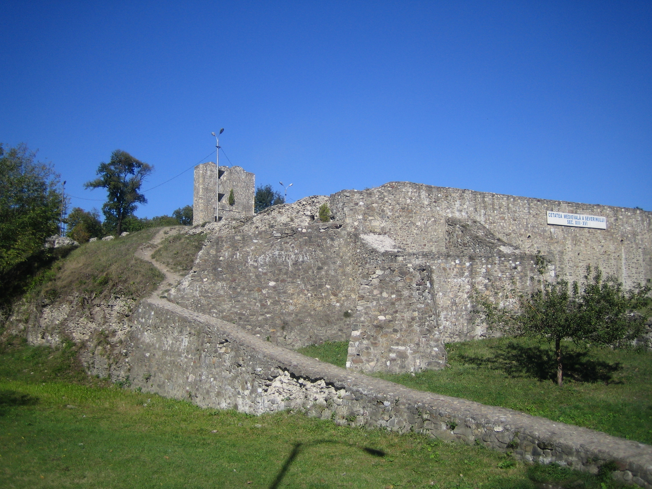 Cetatea Severinului 2